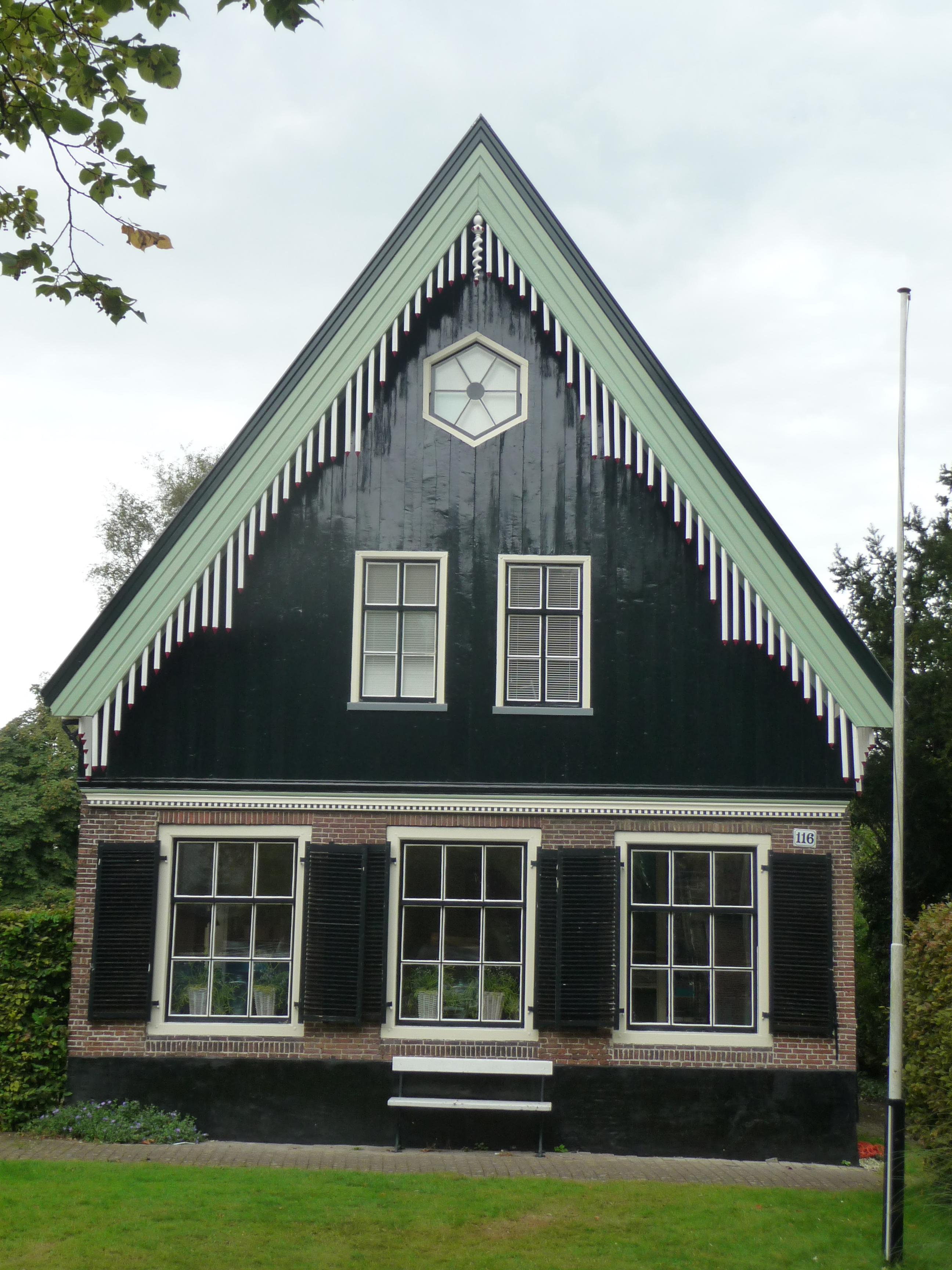 Dit is een foto van het oude woonhuis aan de Dorpsstraat in Nieuwe Niedorp. De foto is gemaakt in september 2012. De kwaliteit is erg slecht.